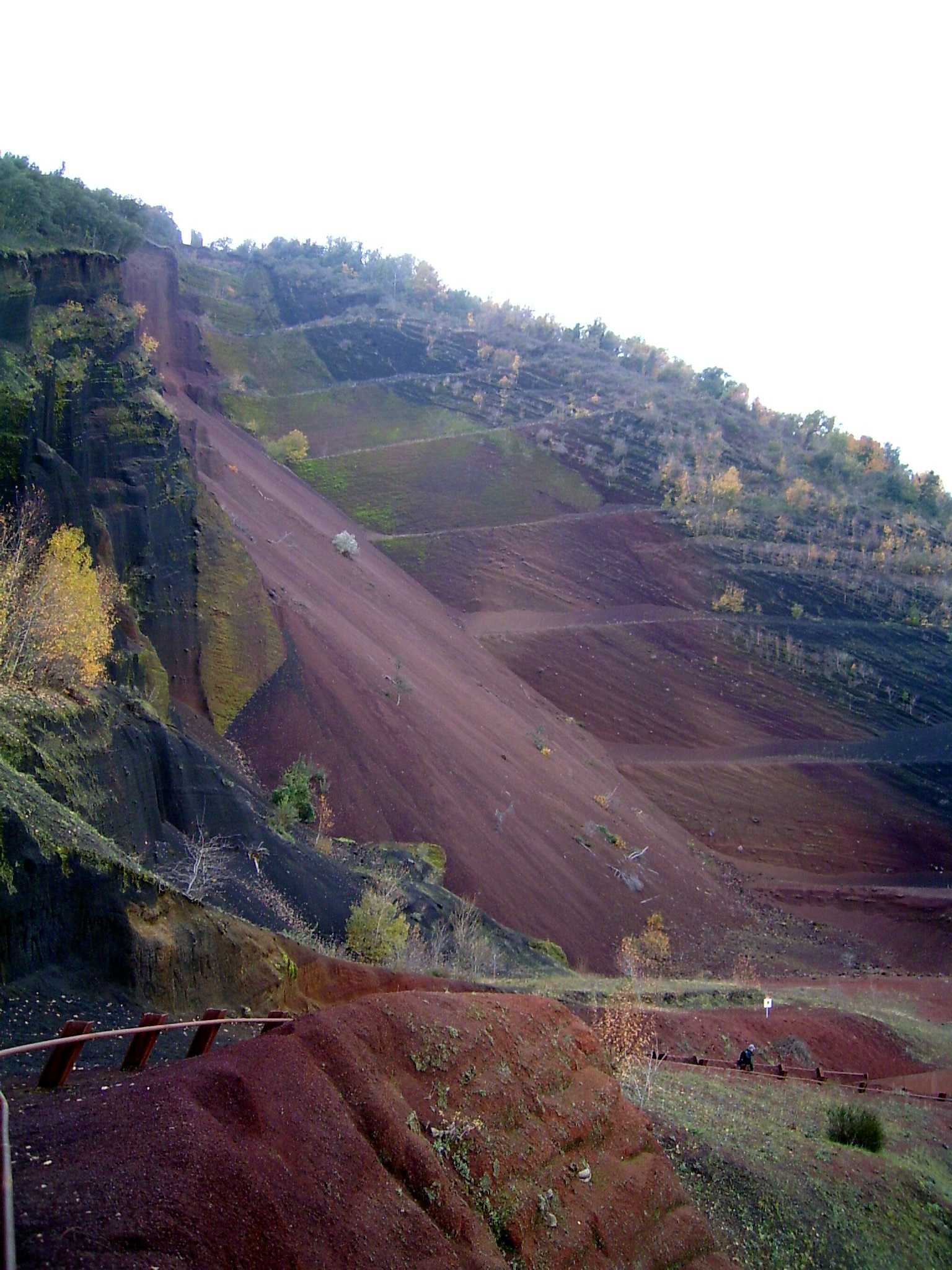 Volcà del Croscat, Santa Pau, la Garrotxa, (Catalunya). Reserva Natural del Croscat.